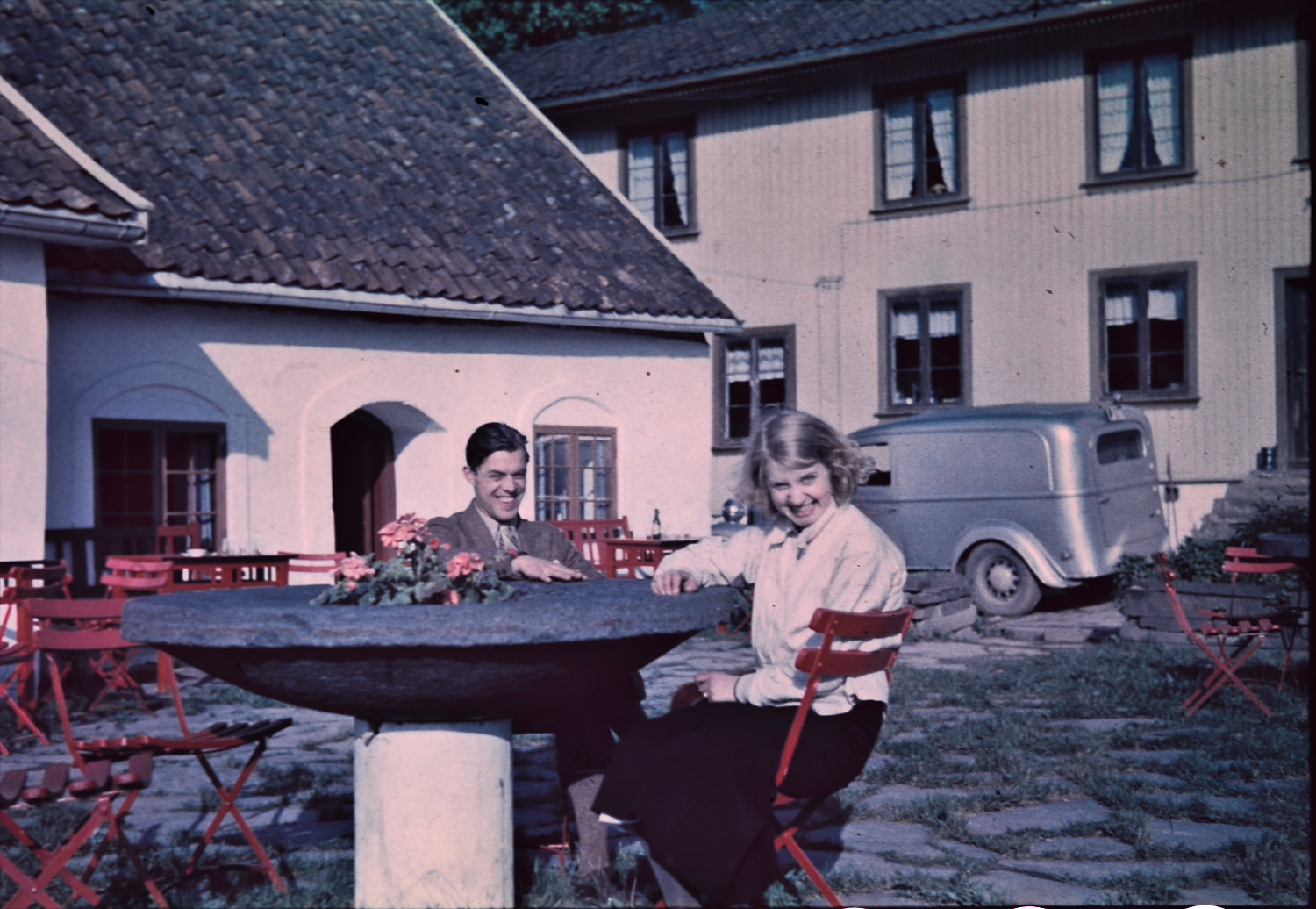 Bildet er hentet fra Arkivverket. Gårdsanlegg. Fotograf: Thomas Neumann År: 1937 Kamera: Leica Film: Agfa color neu Arkivreferanse: PA1456Ub1_1_3_3 Arkivinstitusjon : Riksarkivet Arkivnavn : Neumann, Thomas Sted : Norge, Ukjent, Ukjent, Emneord: Arkitektur Avbildet